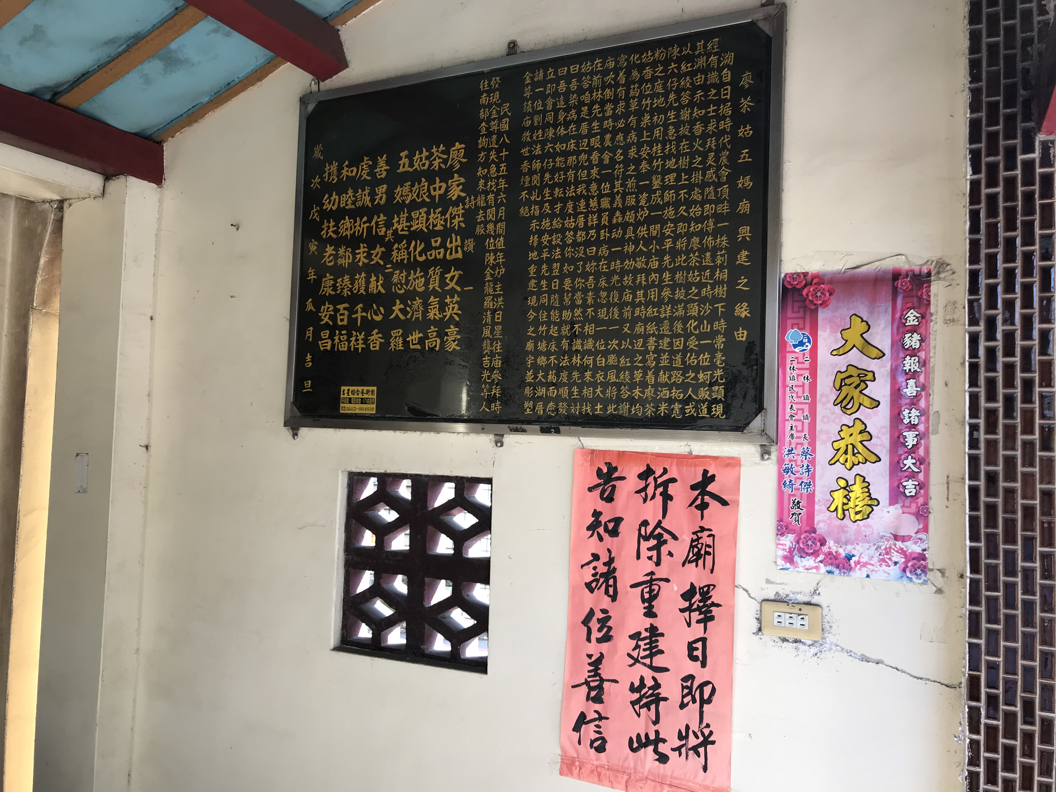 廖茶姑五媽廟說明牌與告示